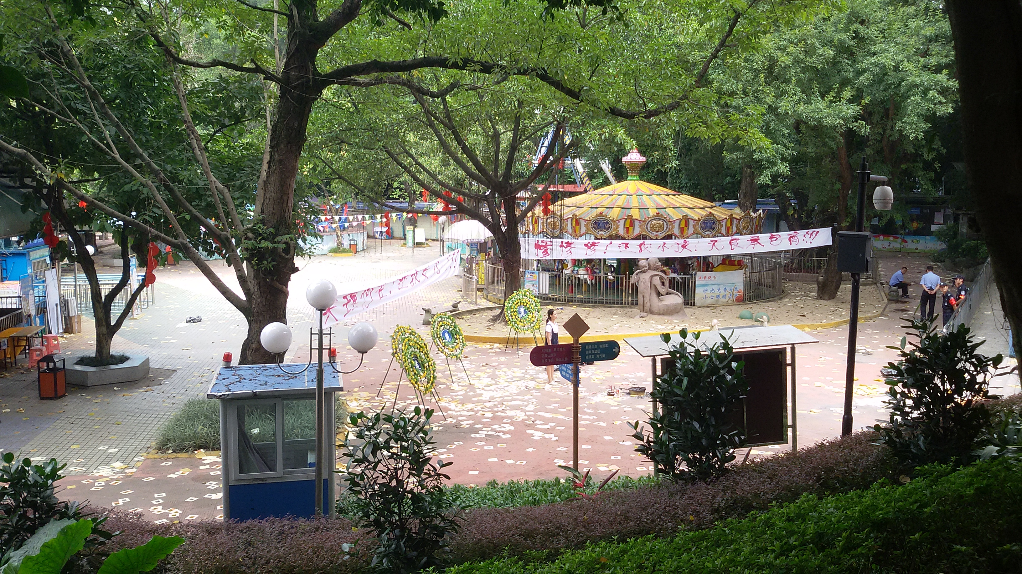 粵語: 2016年9月20號，當日有位家屬喺公園門口大鬧水上樂園嘅維權行動。